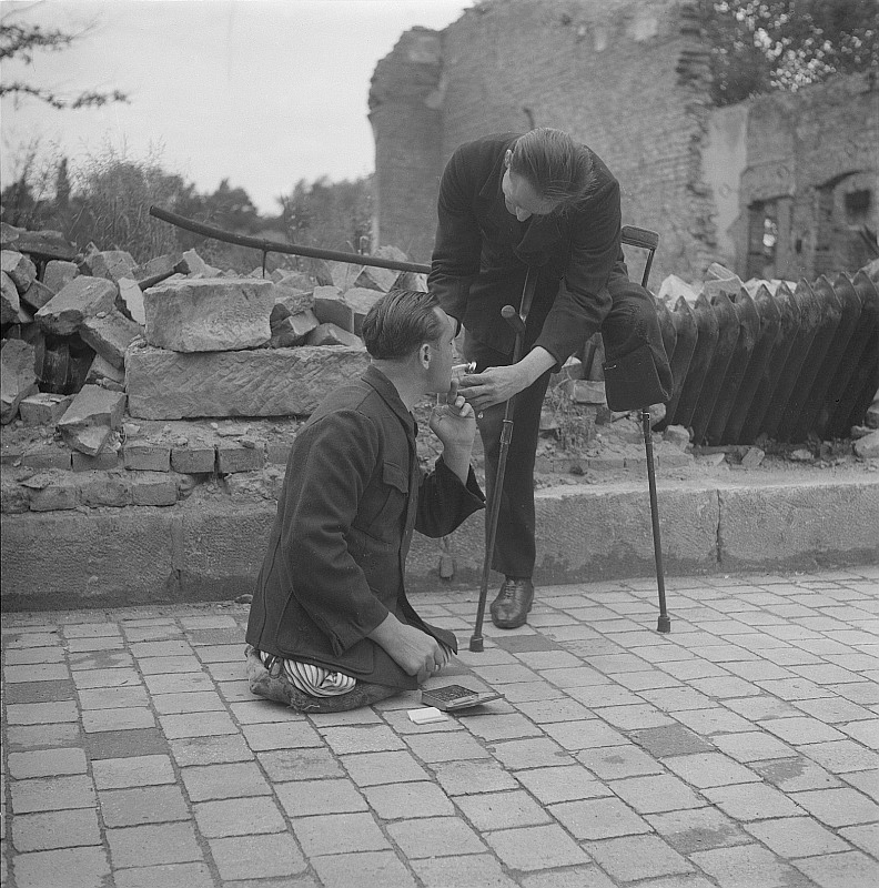 Original image description from the Deutsche FotothekVersehrte des 2. Weltkrieges